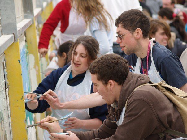 תמונה מתוך פעילות ארגון אח בוגר באשדוד